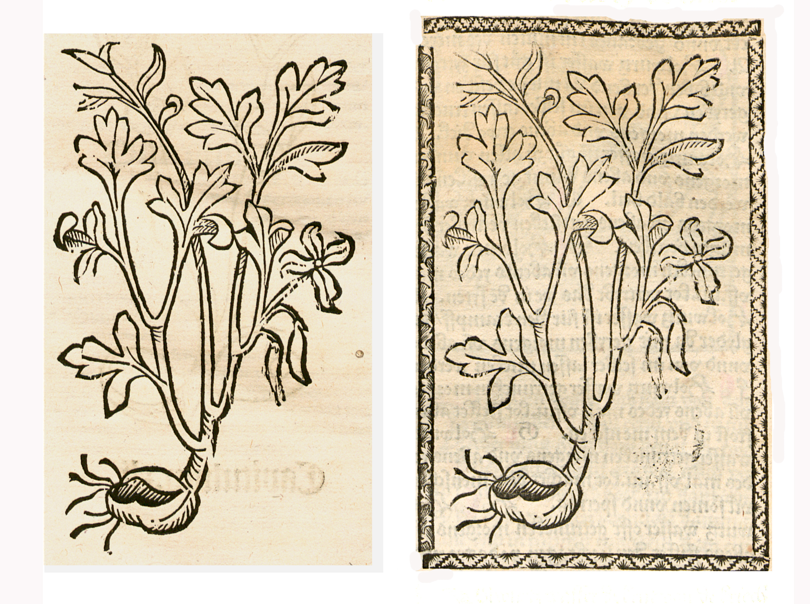 Abbildung von: Holwurtz (Aristolochia rotunda)